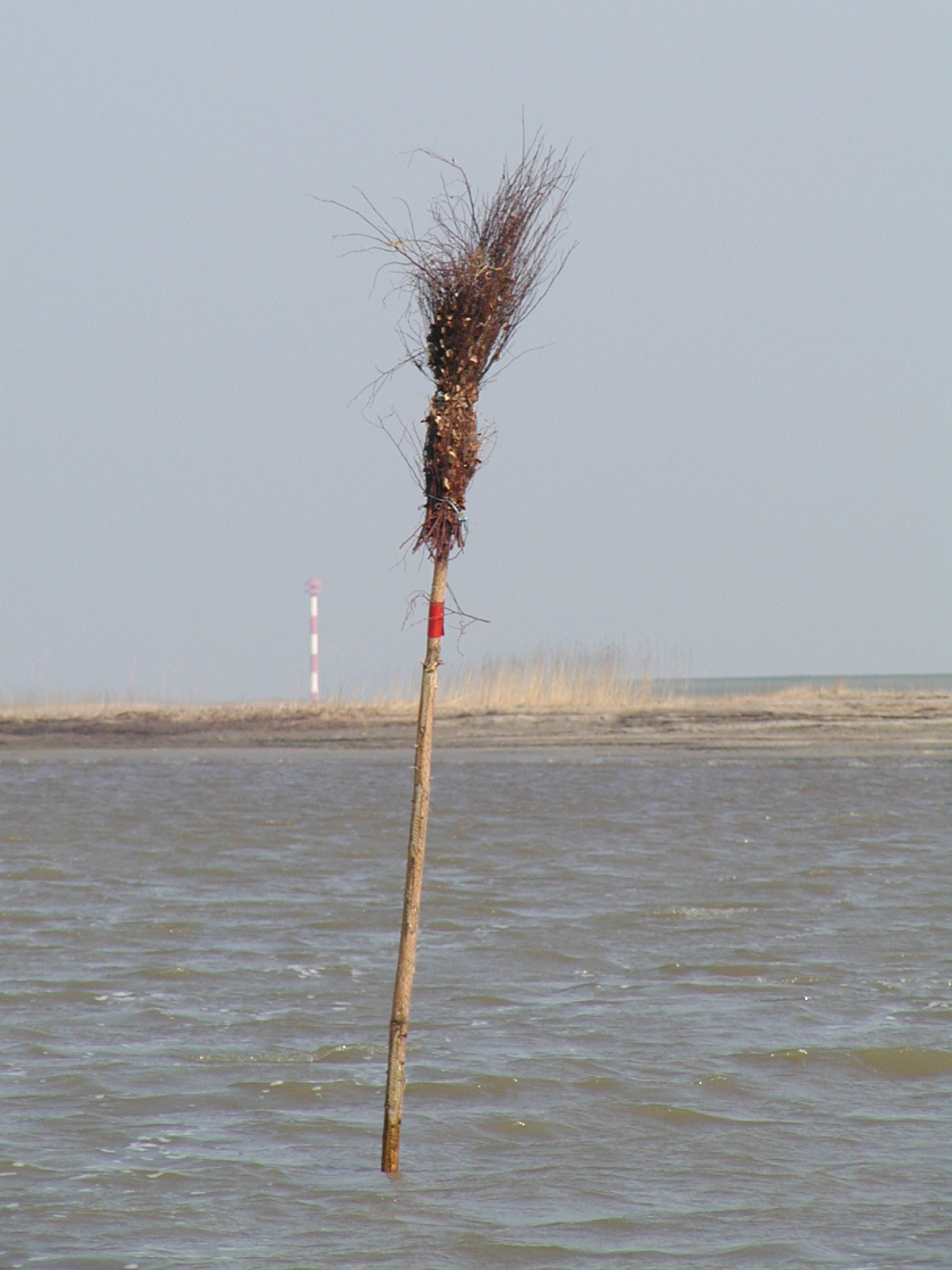 Eine Prigge / Pricke in der Ostemünde, auf Backbordseite von See kommend. Im Bild Typ: Backbord: in den Grund gesteckte Birken oder Stangen, an deren oberen Ende unten zusammen gebundene Zweige befestigt wurden (stumpfe Form), die Stangen tragen meist ein kleines rotes Reflektorbändchen für Backbord (umgangssprachlich „Birken“ bzw. „Besen“).